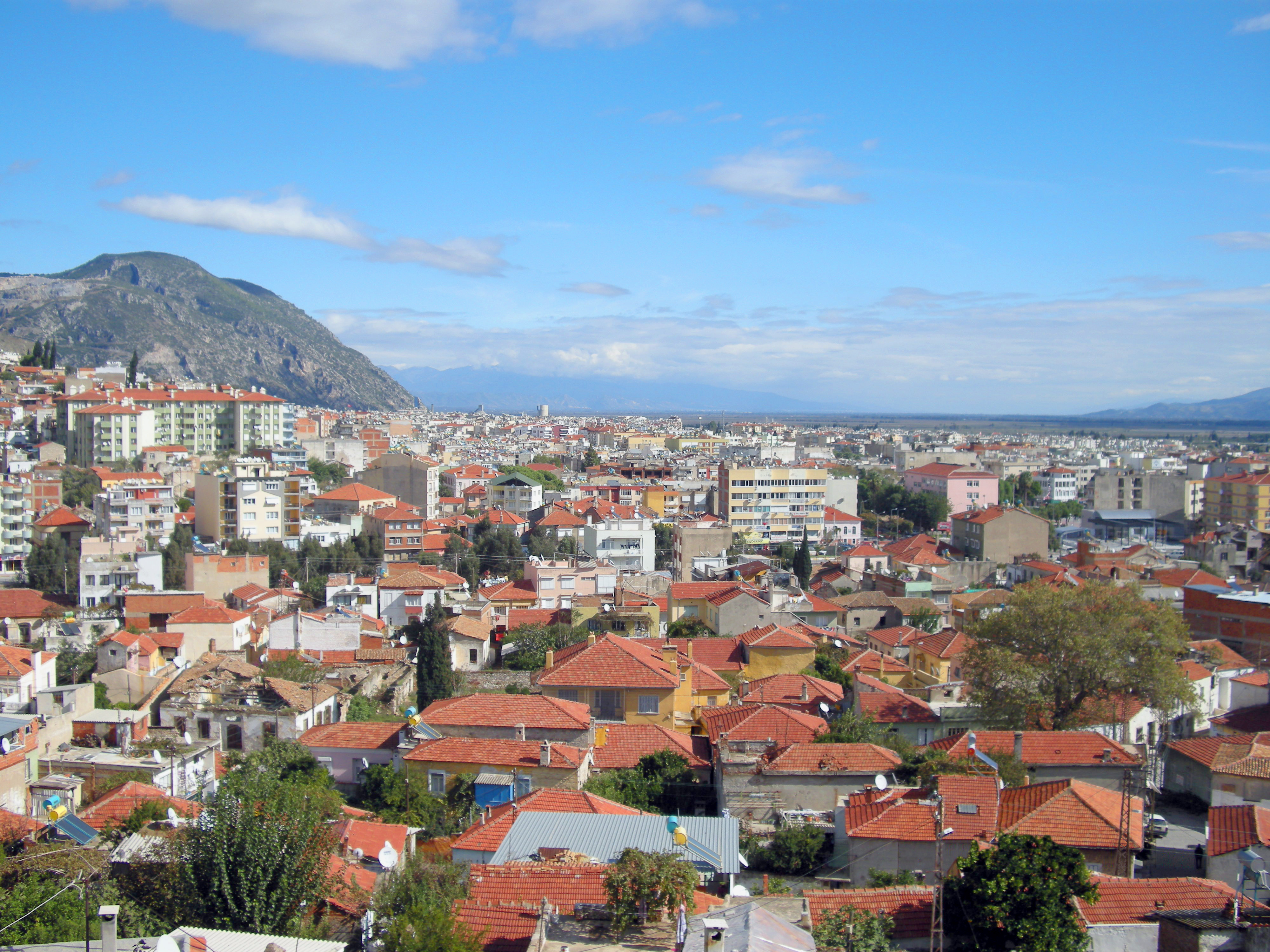 Aydın'ın bir ilçesi olan Söke'nin genel görünümü